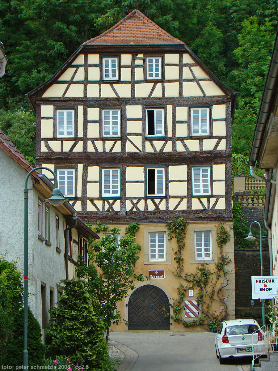 Ehem. Würzburger Amtshaus in Widdern